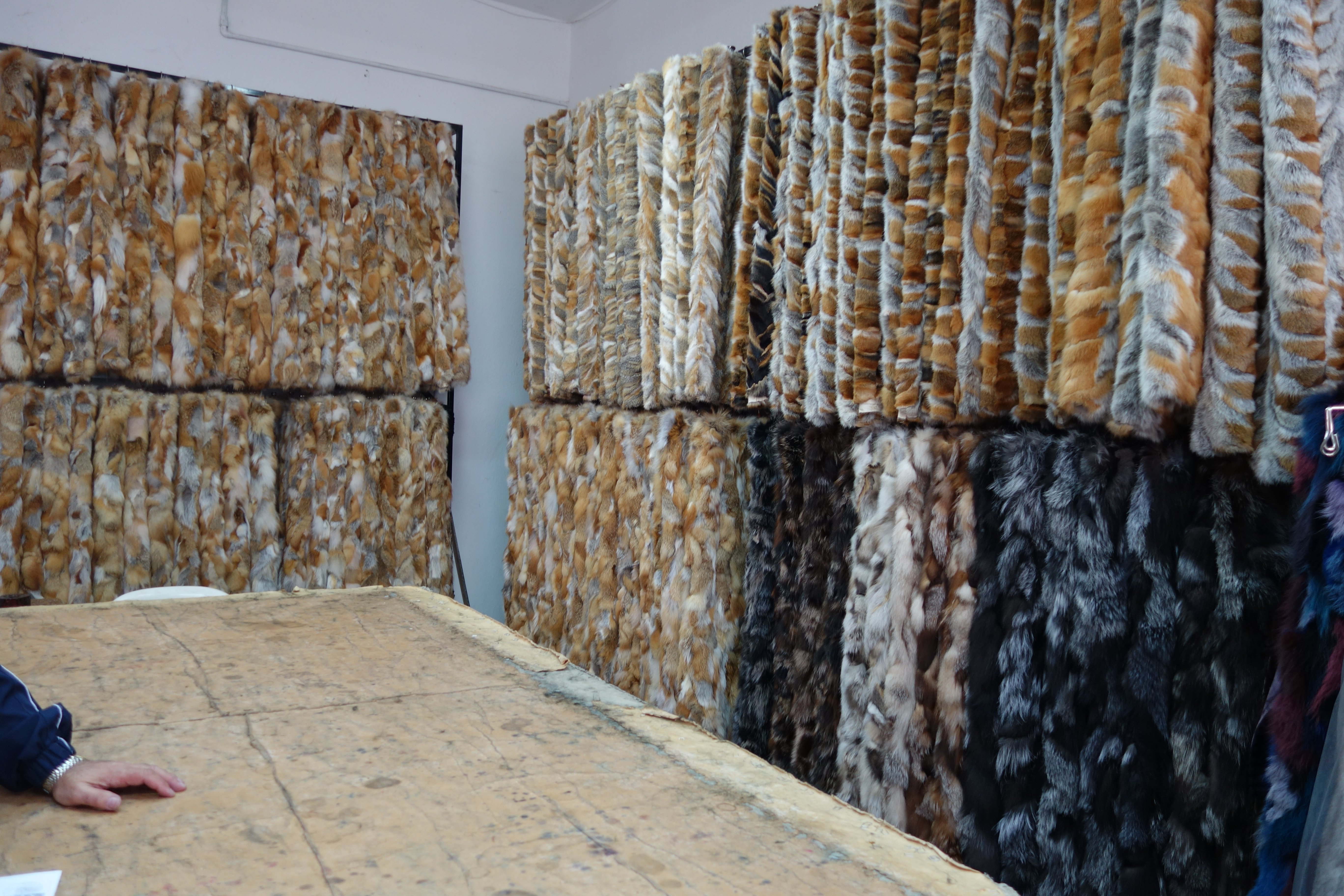 Kürschner in der Stadt Siatista, Griechenland. G. A. Tyma, Spezialist für Fuchsstückenverarbeitung. Fuchsstückenbodies für Jacken und für Mäntel. Siehe auch Kürschner in der Präfektur Kastoria und Kürschner in der Stadt Kastoria.